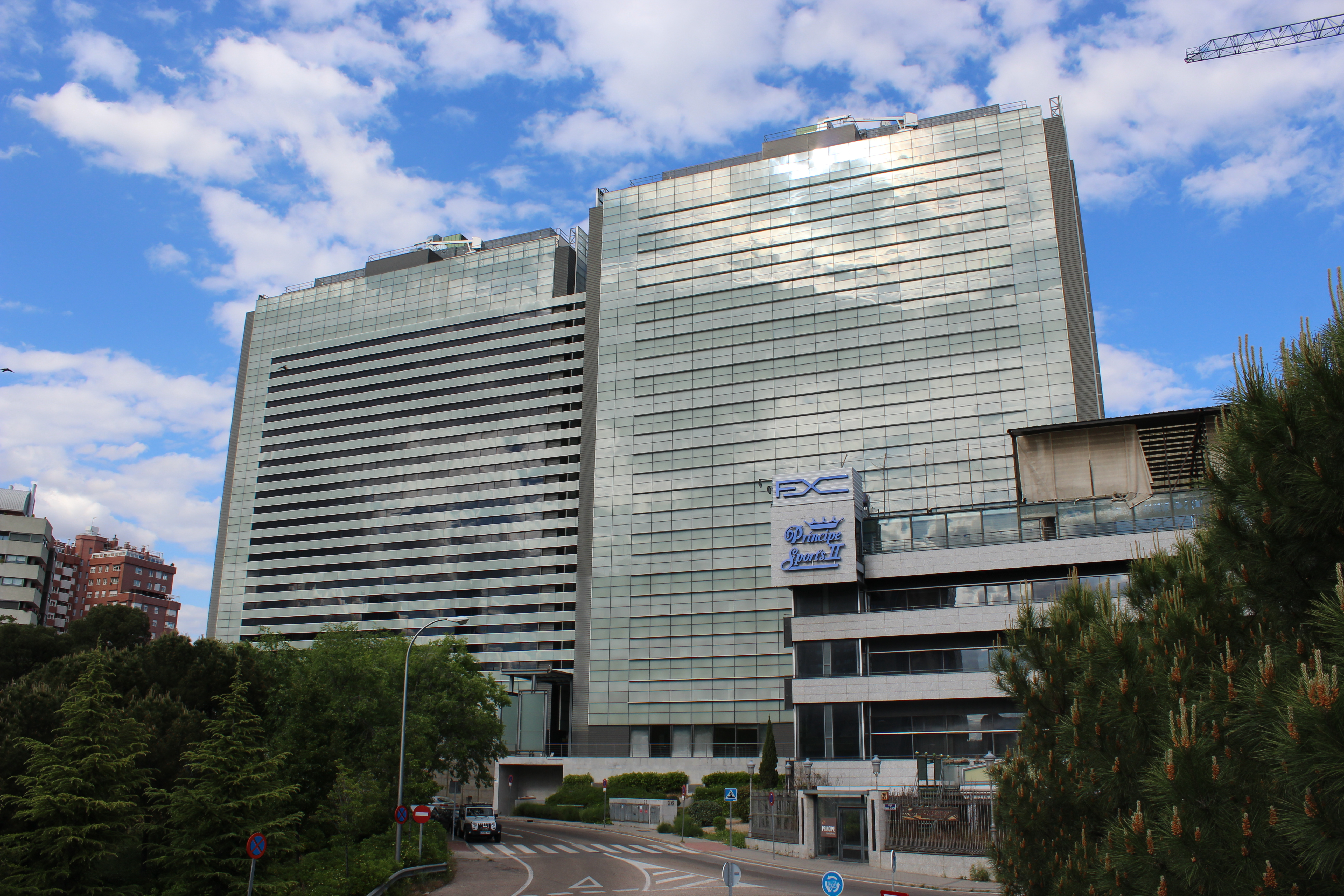 Torres Ágora, Madrid.